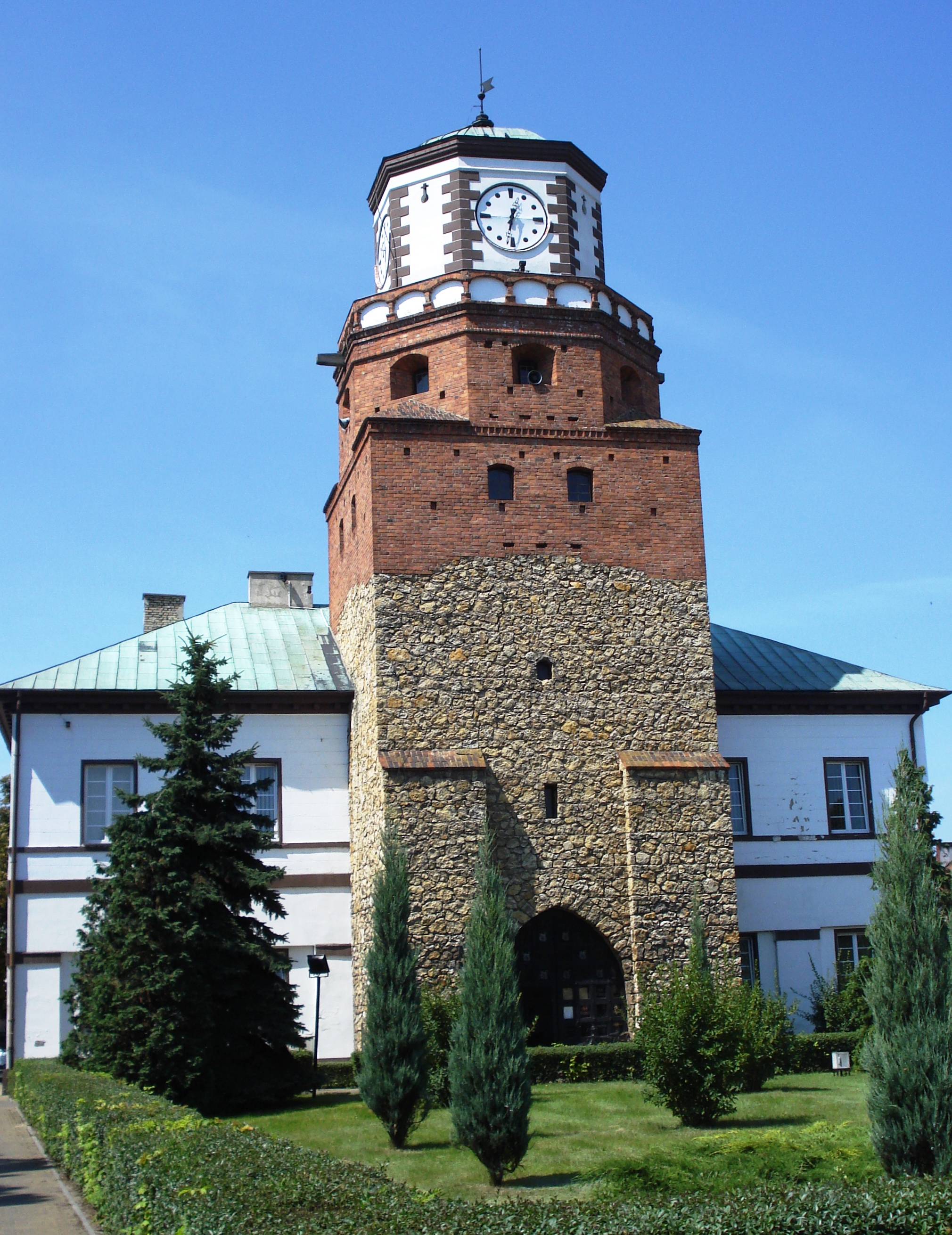 Brama Krakowsk i Ratusz